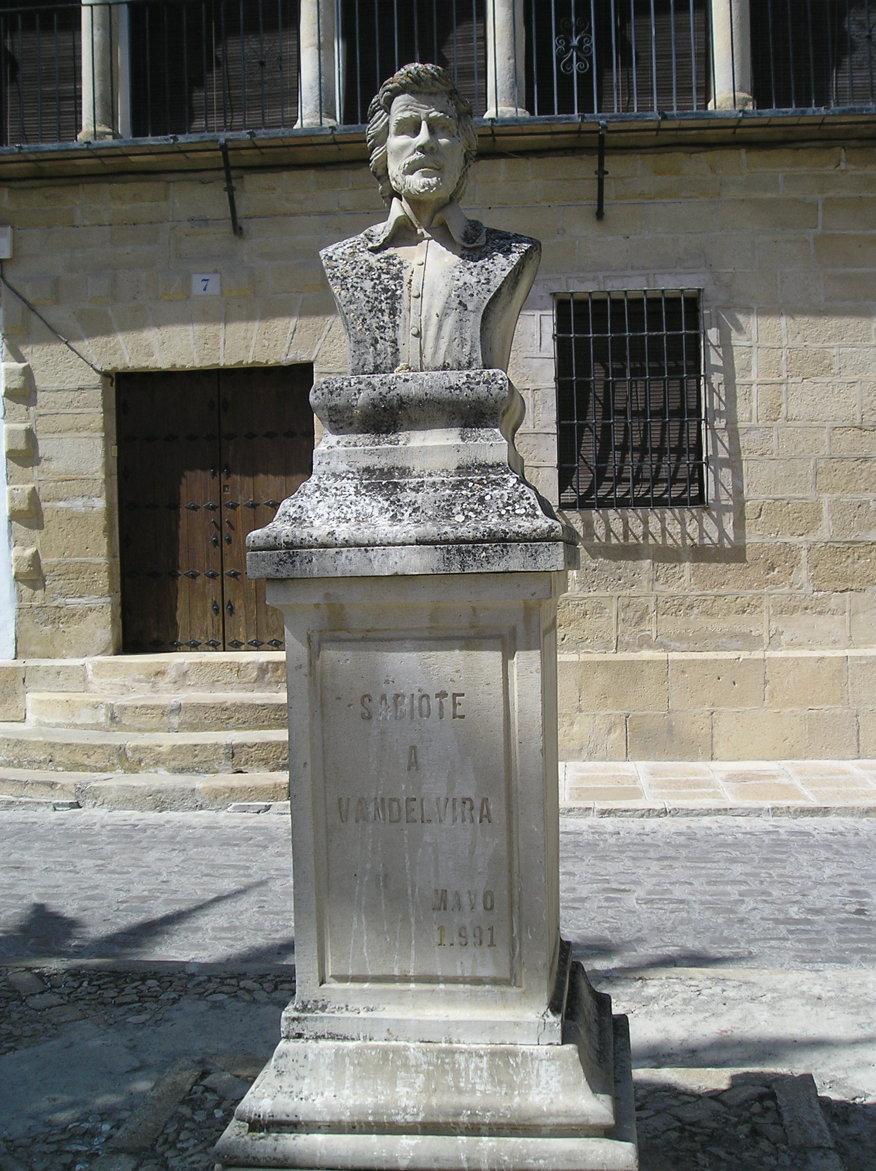 Monumento a Alonso de Vandelvira en Sabiote